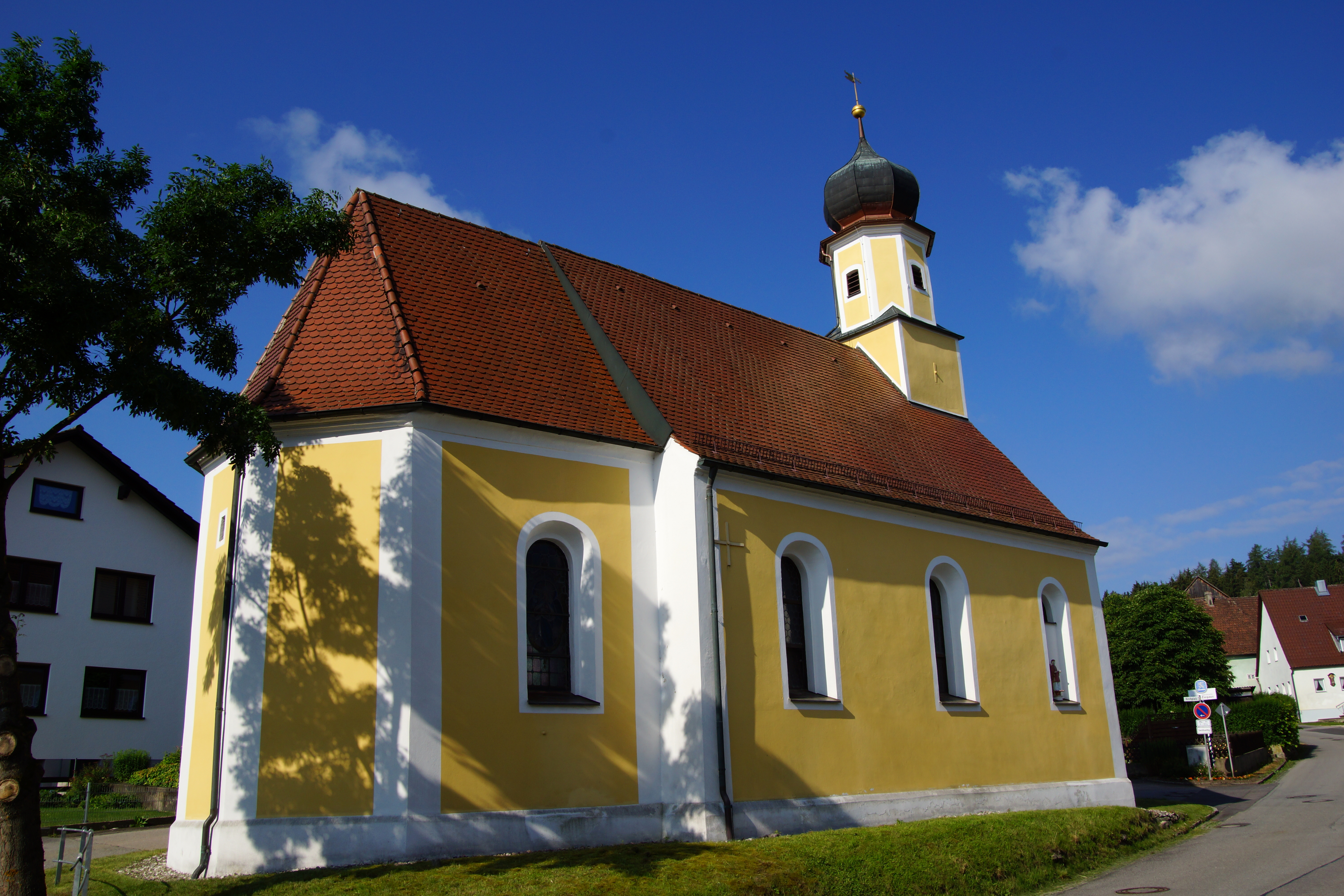 Die katholische Filialkirche St. Stephanus in Hollerstetten bei Velburg